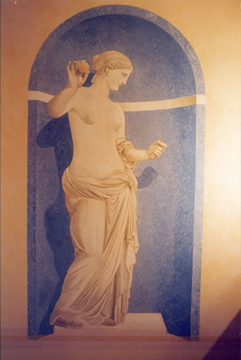 La Vénus d'Arles - peinture en trompe l'oeil - XX° siècle à Carros près de Nice